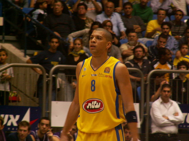 אנתוני פארקר